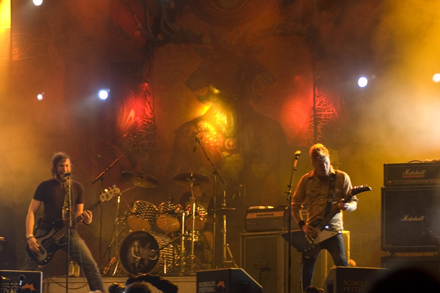 Mastodon @ Roskilde Festival '07